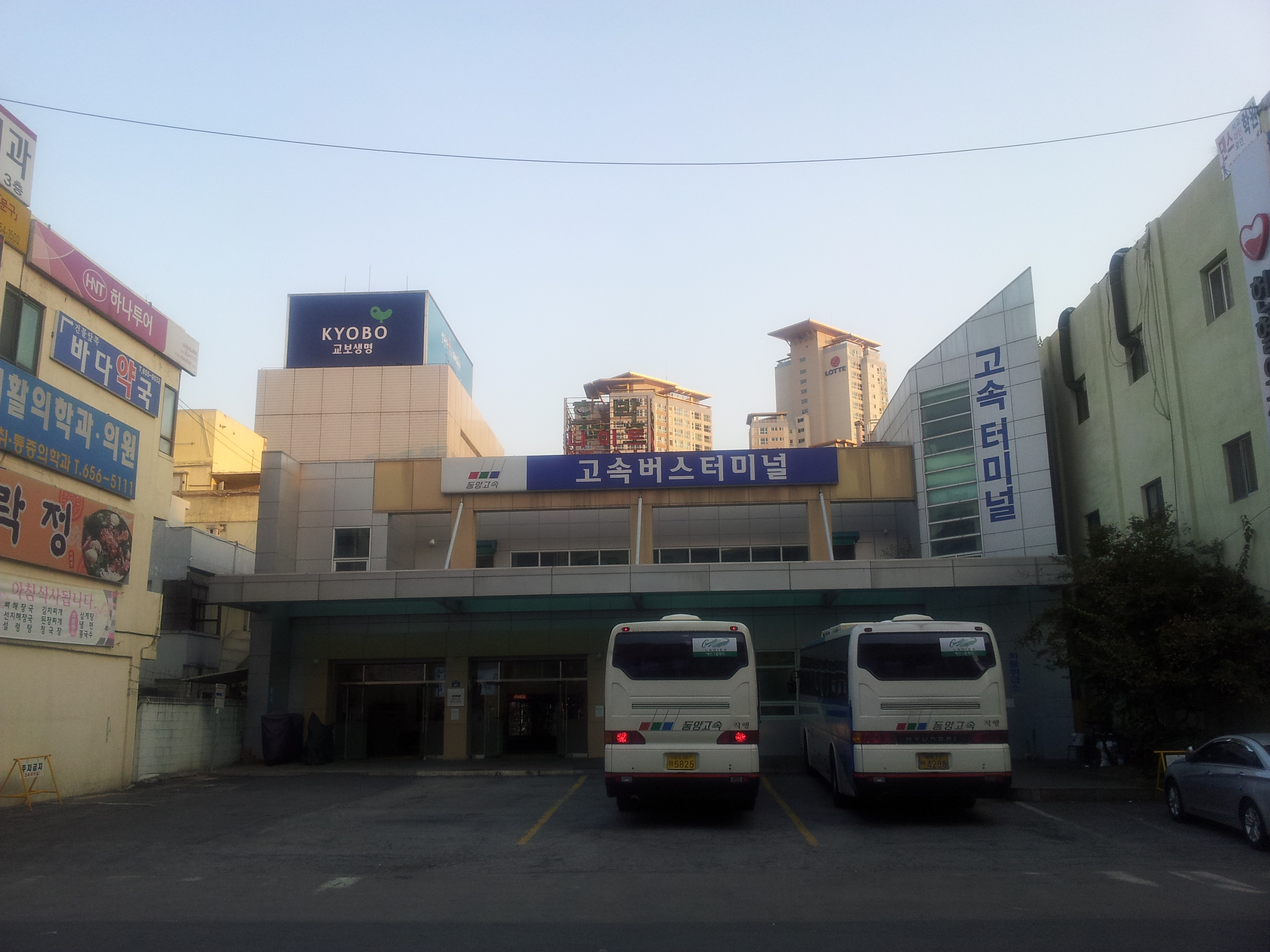 평택고속버스터미널 모습